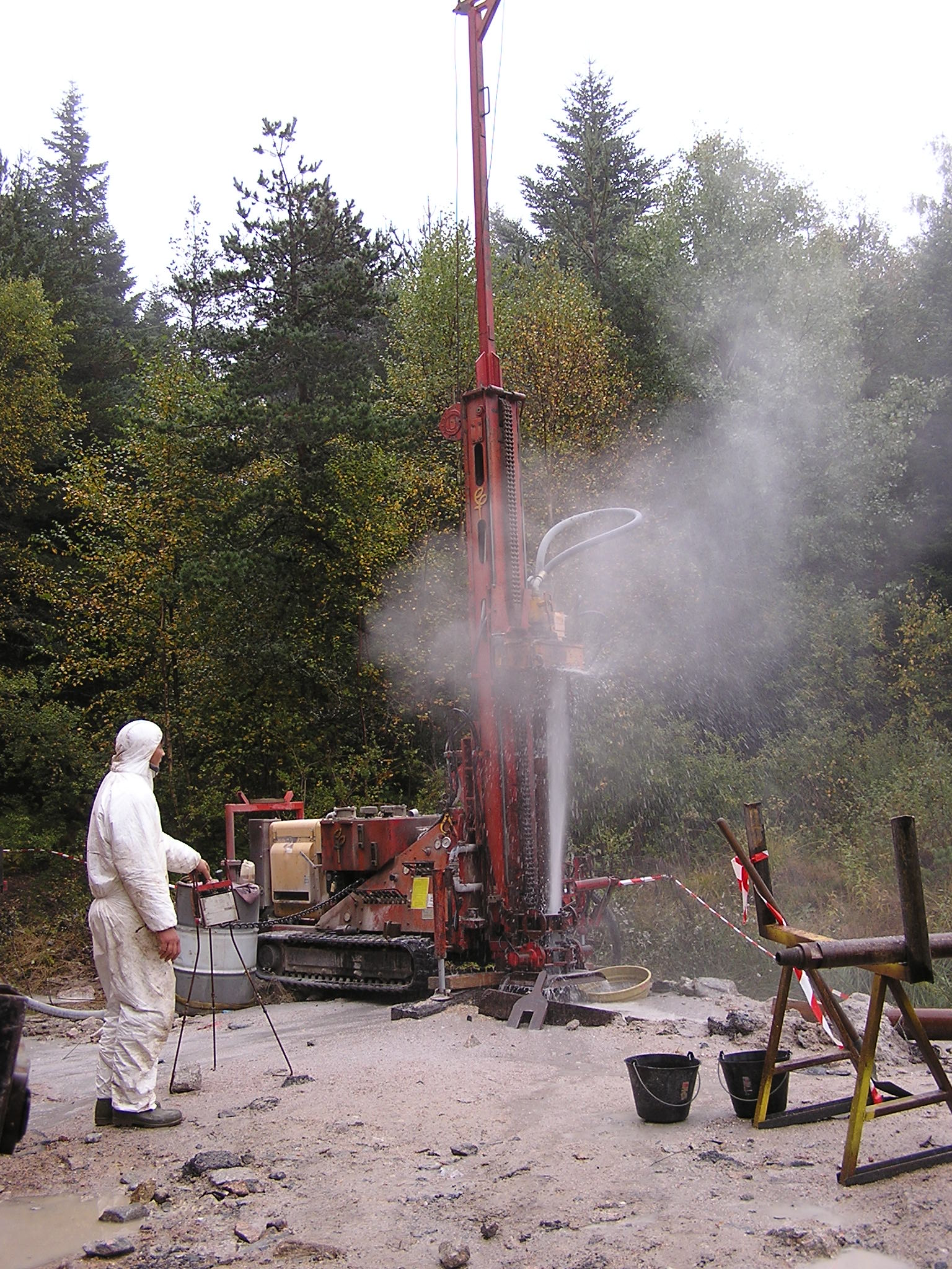 Forage d'eau